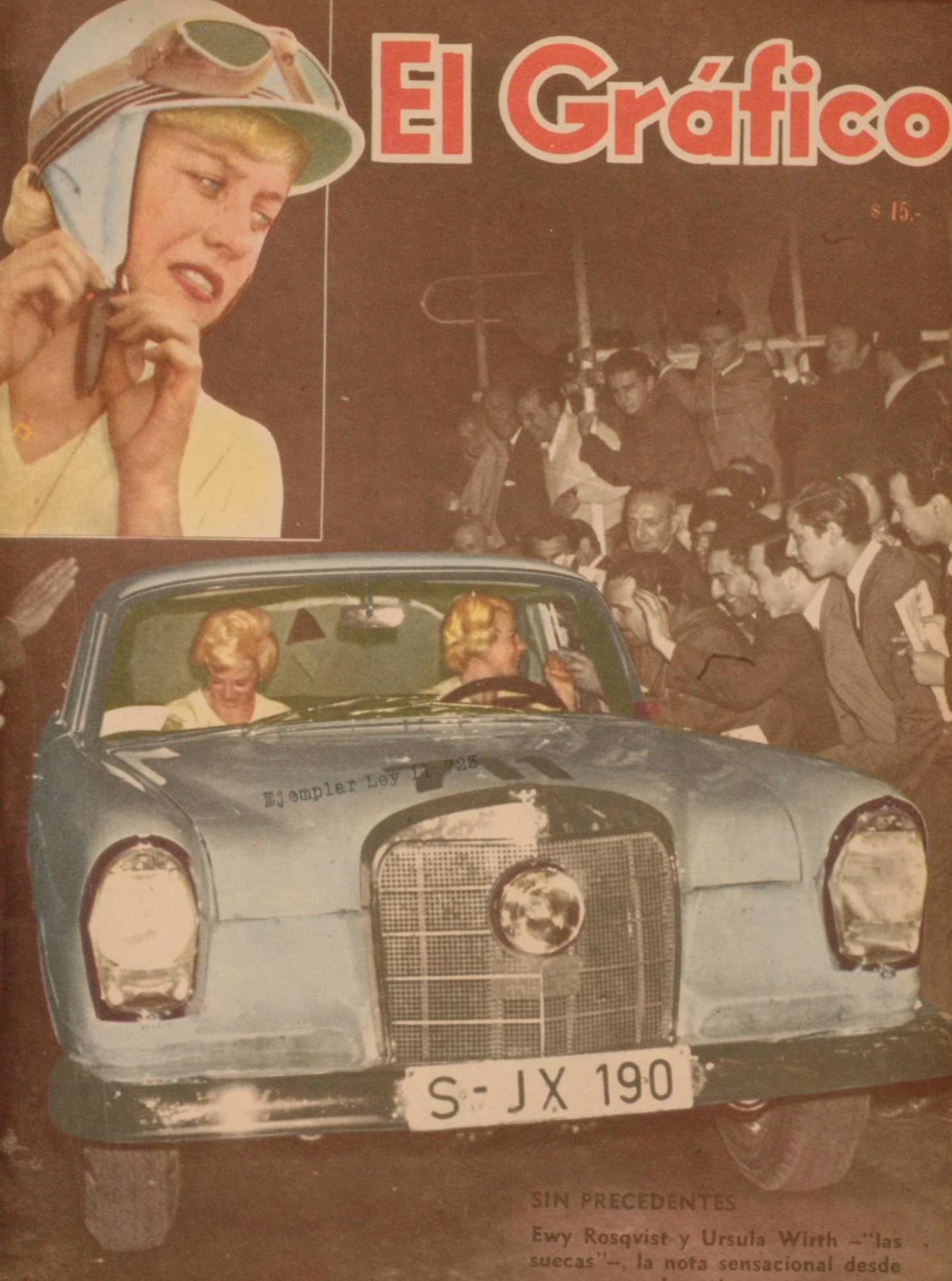 El Grafico del 31 de Octubre de 1962. Edicion 2247